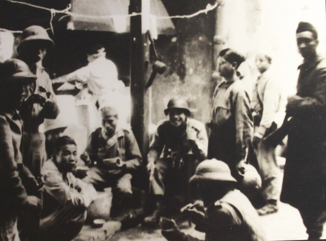 Tổ tự-vệ chợ Đồng-Xuân mùa đông năm '46.